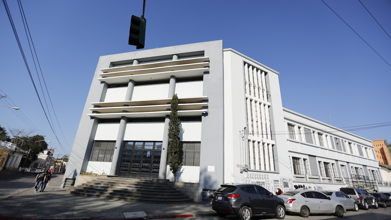 El Conservatorio Nacional de Música "Germán Alcántara" conmemorará su 143 aniversario el 3 de agosto. Los festejos comenzaron el martes 31 de julio con la actuación de los alumnos del curso de colectiva de cuerdas, quienes ejecutaron un variado repertorio en el auditorio de esta casa de estudios.